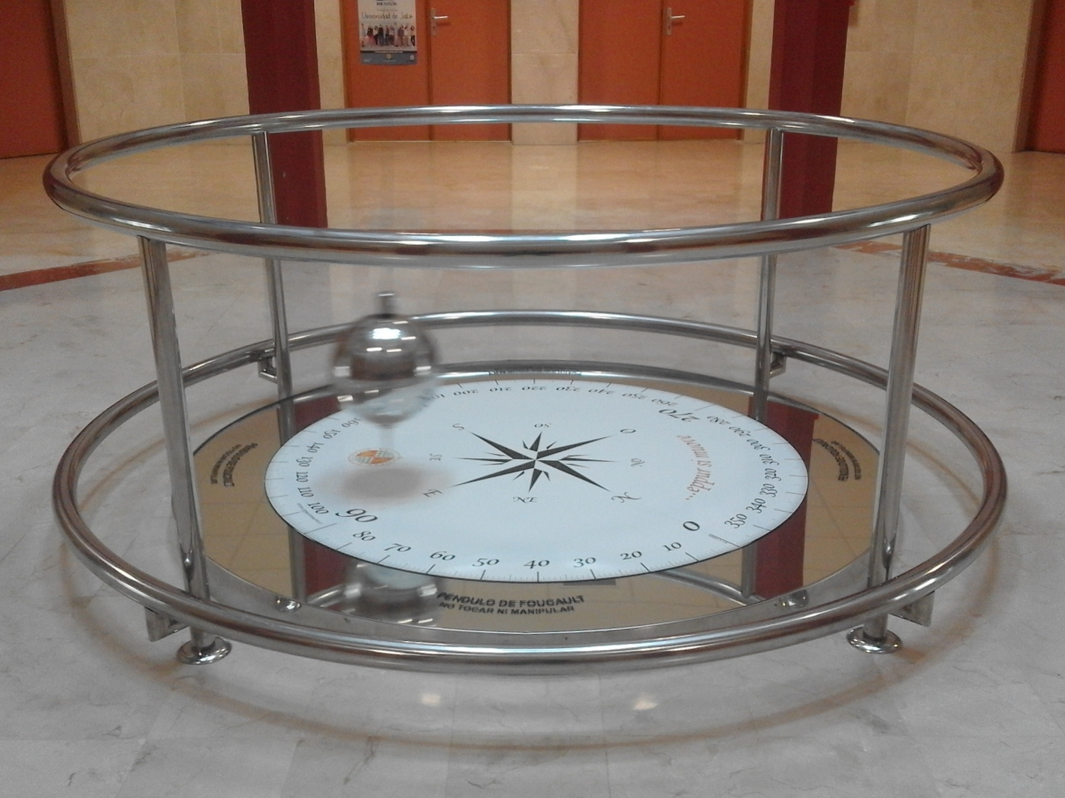 Péndulo de Foucault en plena oscilación en la Universidad de Jaén.